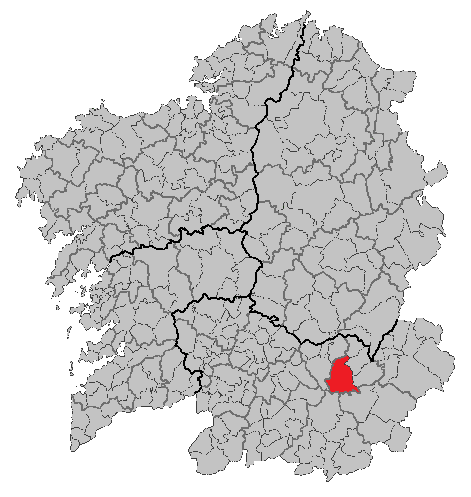 Mapa coa localización do concello de Chandrexa de Queixa.